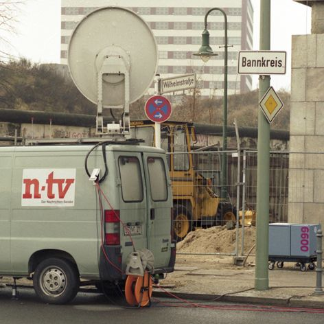 Medienberichterstattung anlässlich der dritten Vernehmung von Helmut Kohl vor dem Spenden-Untersuchungsausschuss am 25.01.2001 in Berlin